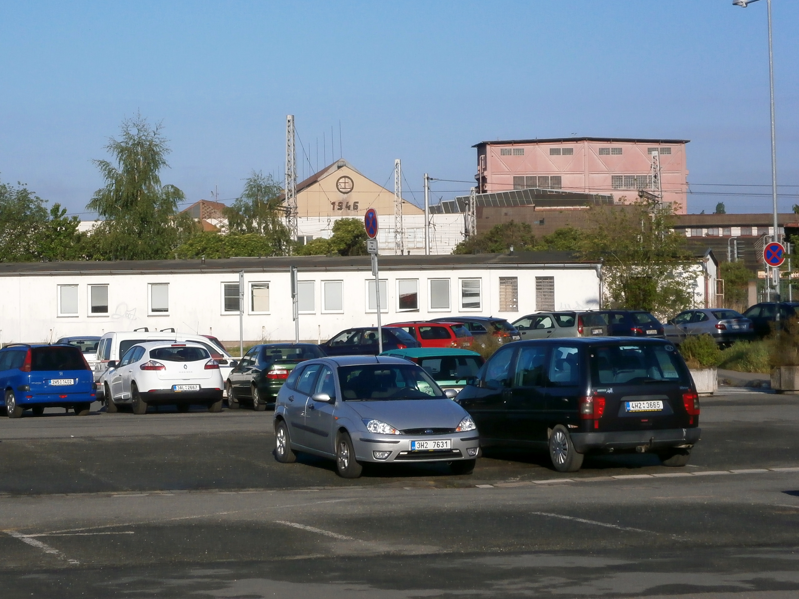 Areál ZVU, bývalých Závodů Vítězného února